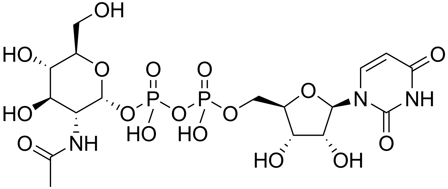 chemical structure of UDP-N-acetylglucosamine (uridine diphosphate N-acetylglucosamine)